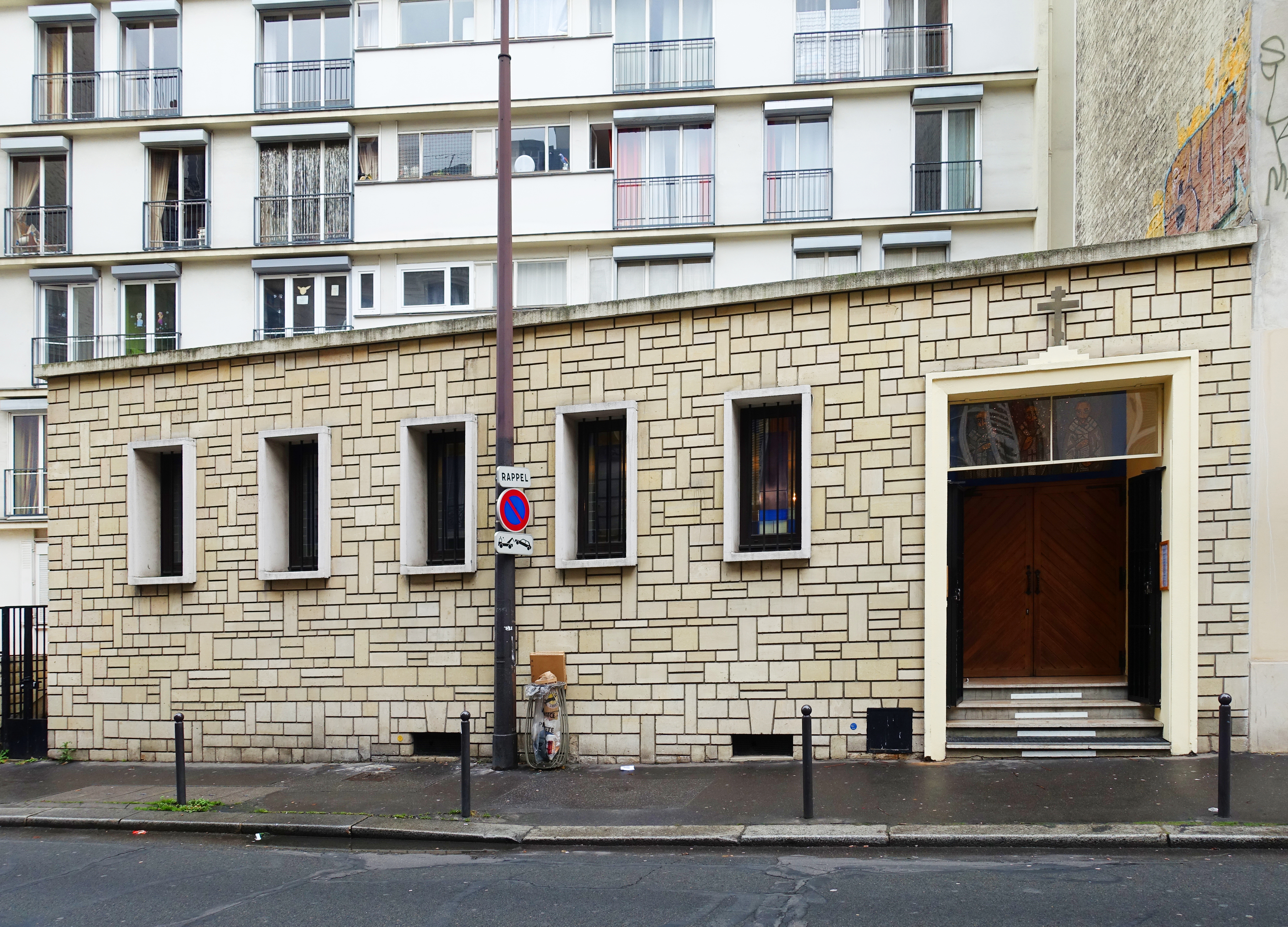 Eglise des Trois-Saints-Docteurs @ Paris